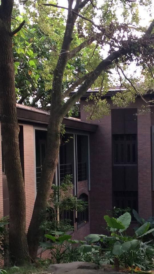 中文（台灣）: 張學良故居台北市復興三路70號，張學良一生居住最久的地方